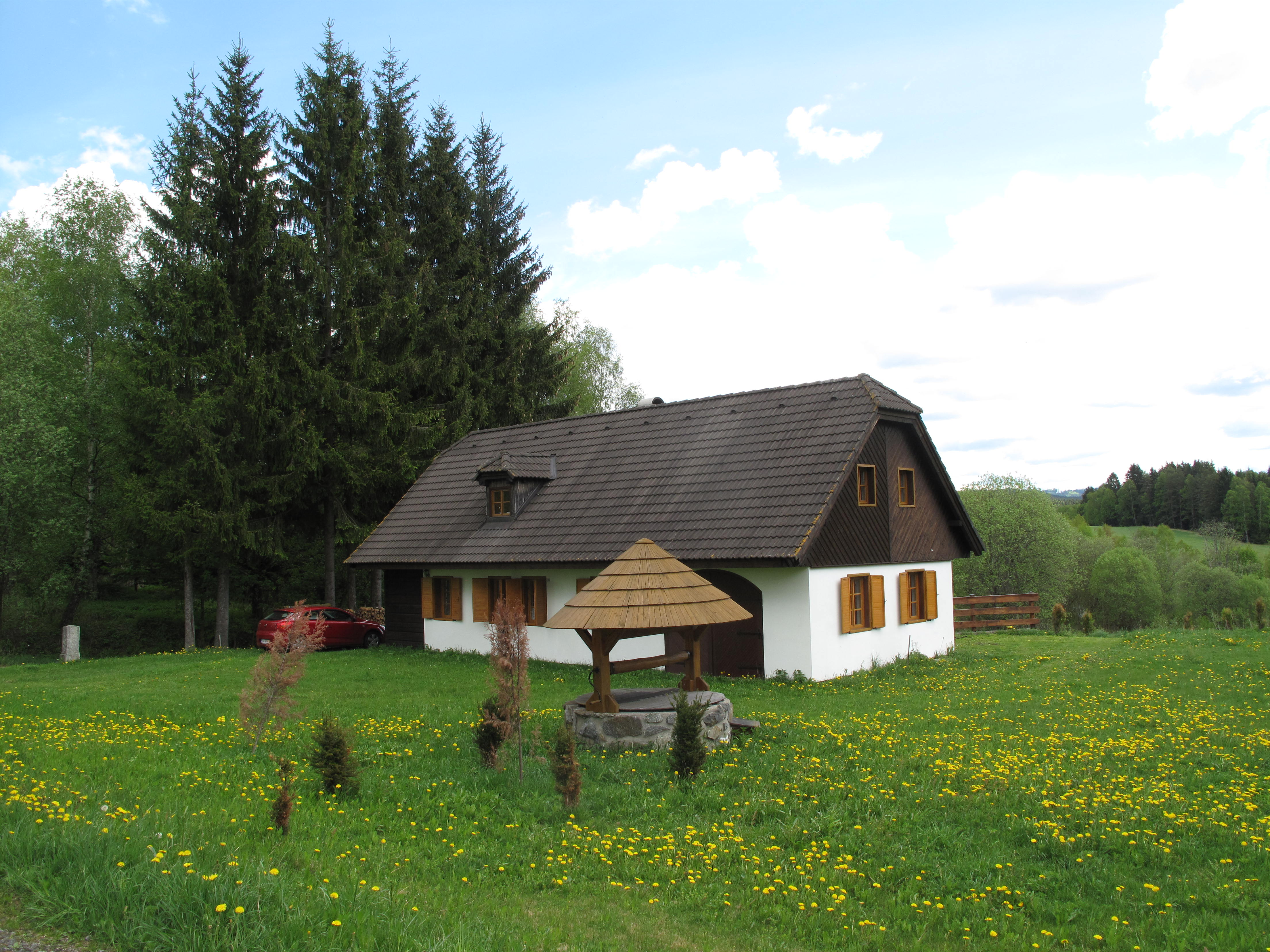 Dolní Příbrání, dům